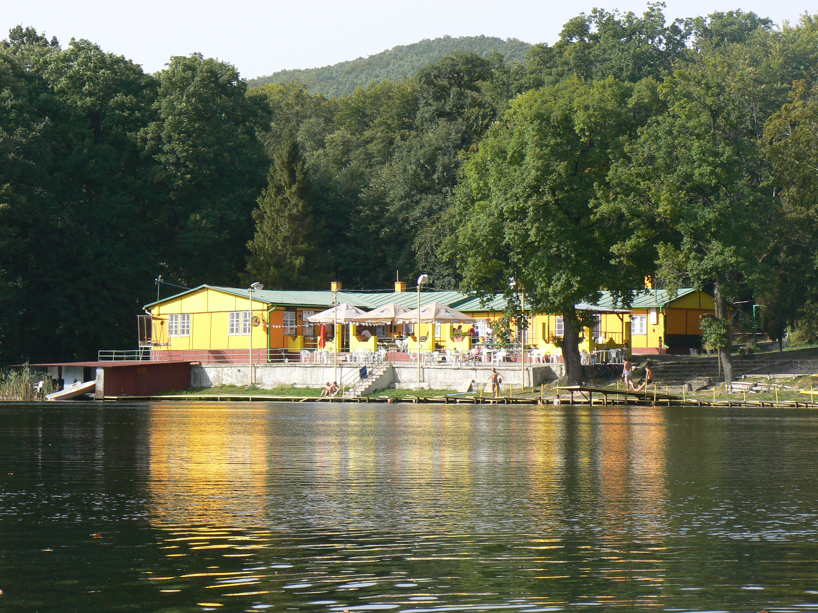 Reštaurácia na Izre.